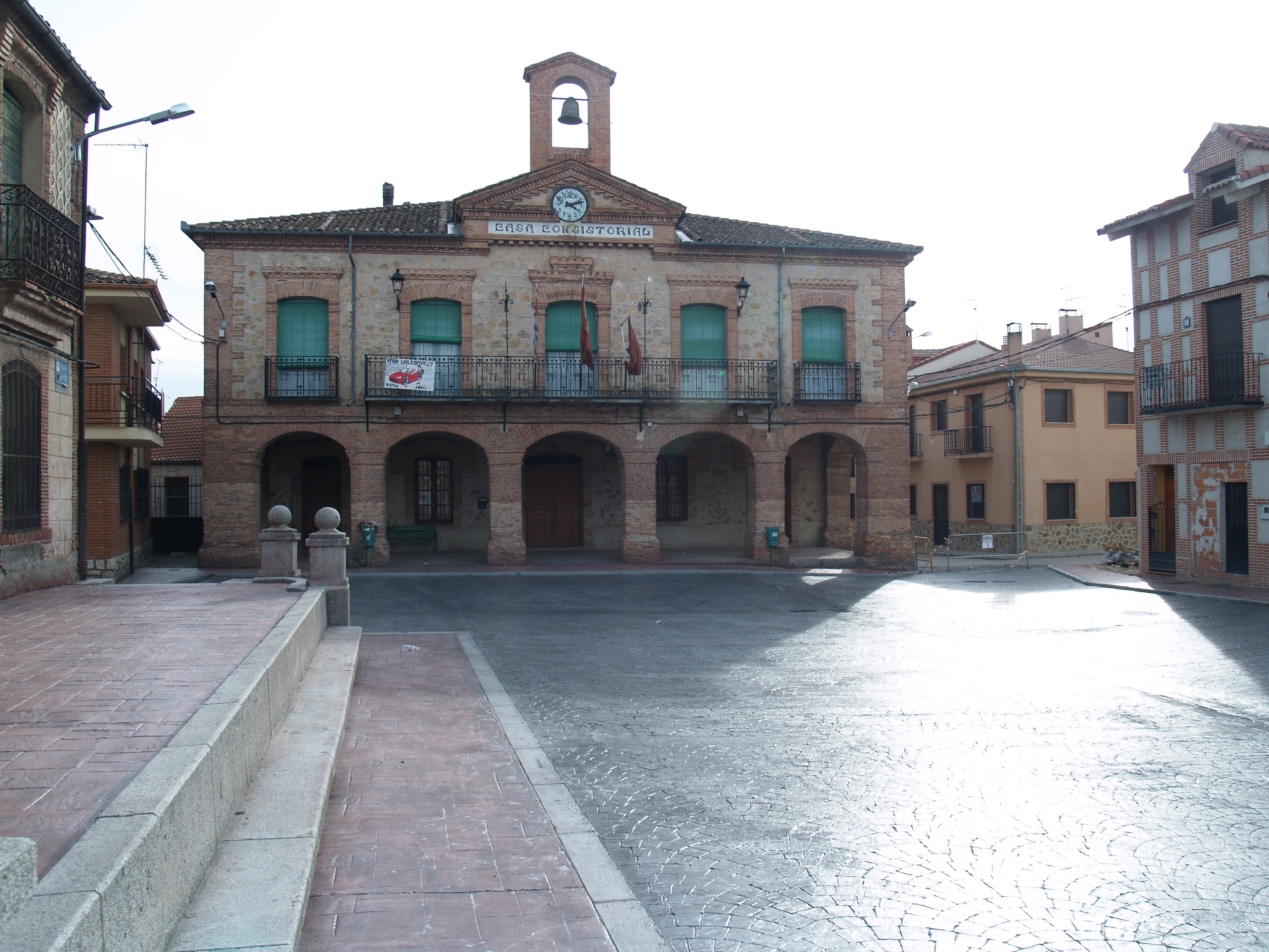 Ayuntamiento de Lastras de Cuéllar (Segovia)